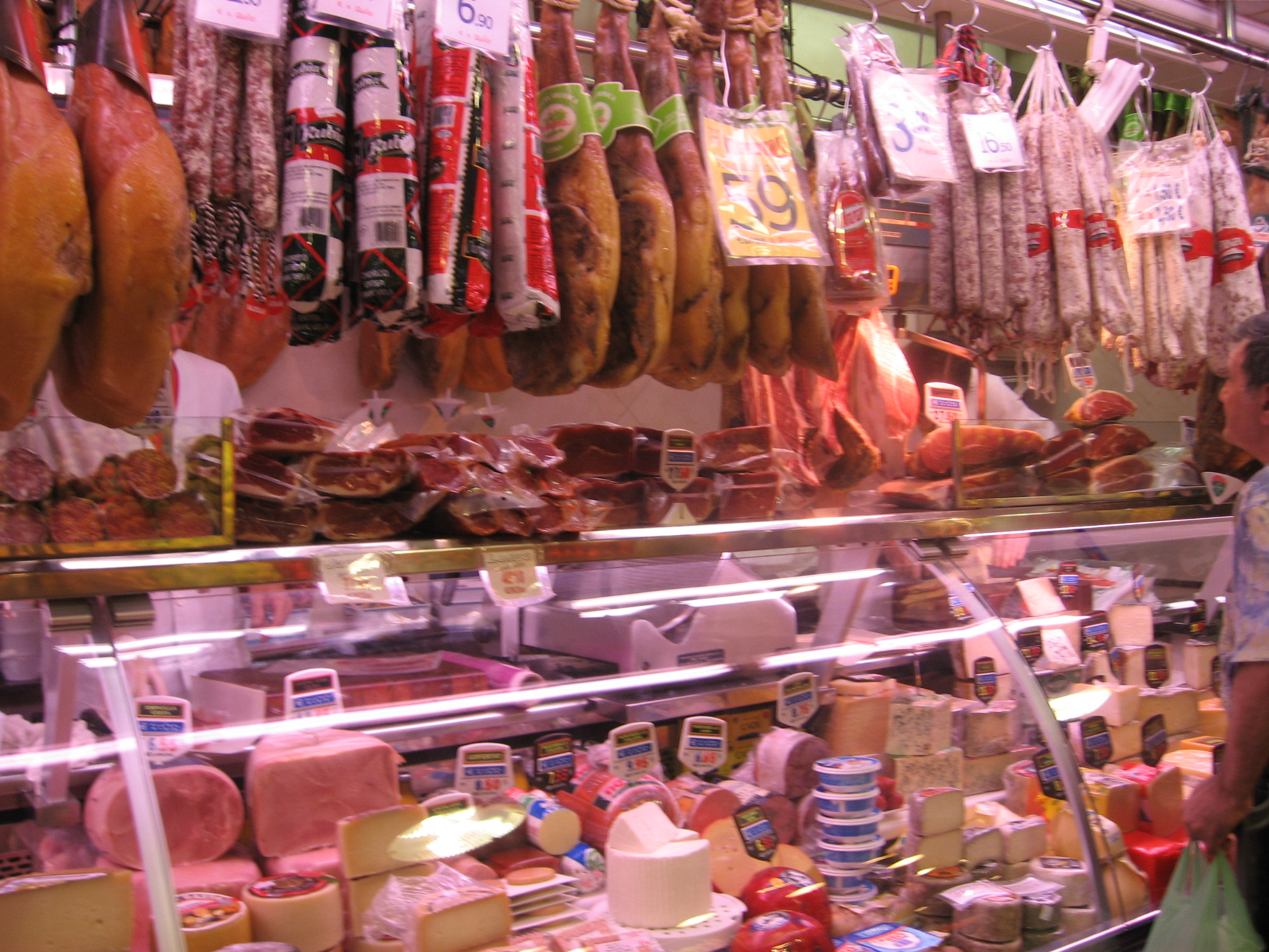 Mercat de la Boqueria, meats and cheese